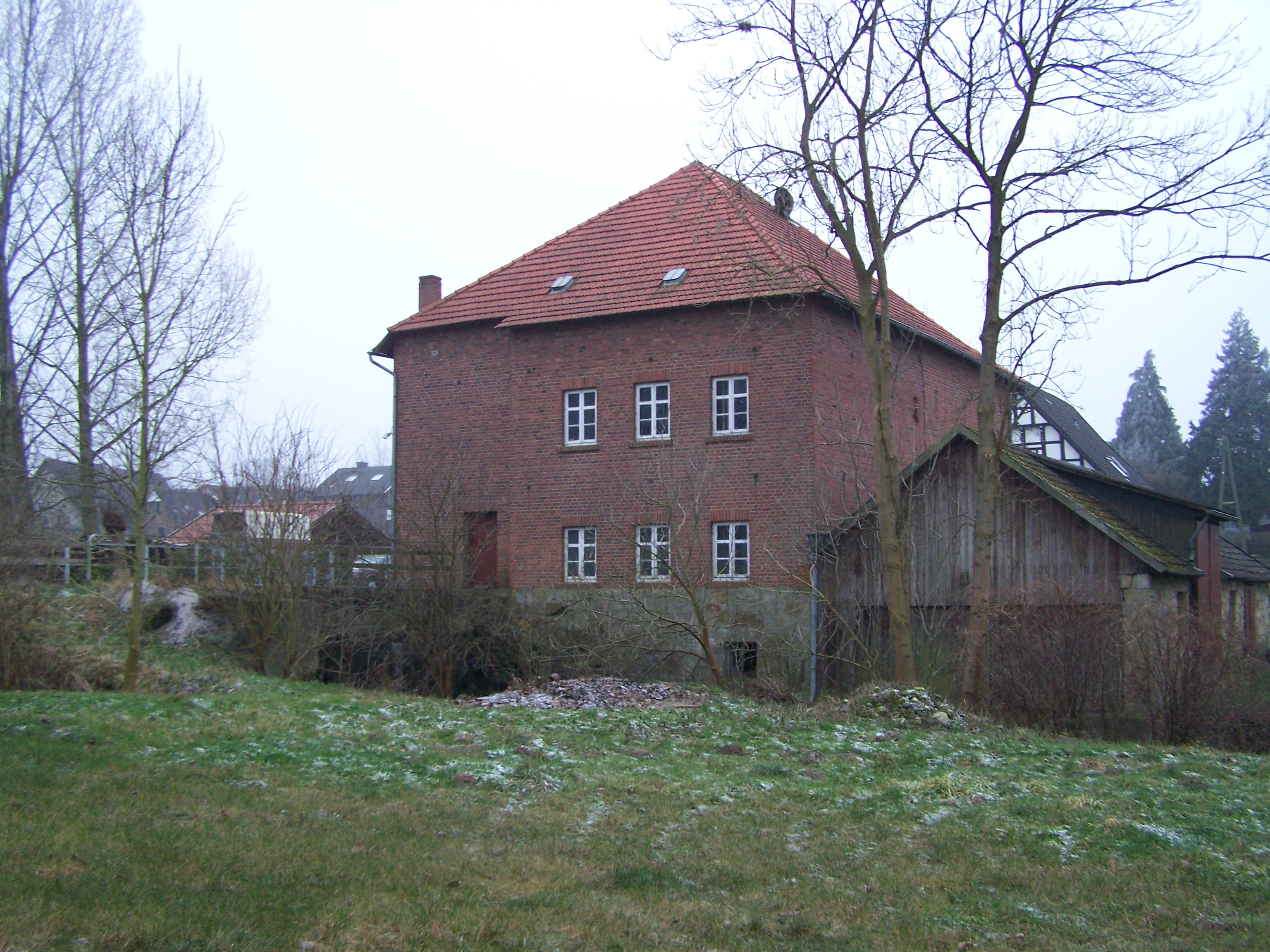 Die ehemalige Ledder Wassermühle